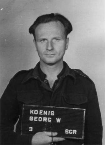 Haftbogenfoto des Angeklagten Georg Wilhelm König (27.04.1911 in Meerane - 03.01.1999 in Mannheim), SS-Hauptscharführer, Block- und Kommandoführer im Konzentrationslager Buchenwald, Rapportführer im Konzentrationslager Mittelbau-Dora, im Dachauer Dora-Prozess ("Case No. 000-50-37 Dora") am 30.12.1947 zu lebenslanger Haft verurteilt.